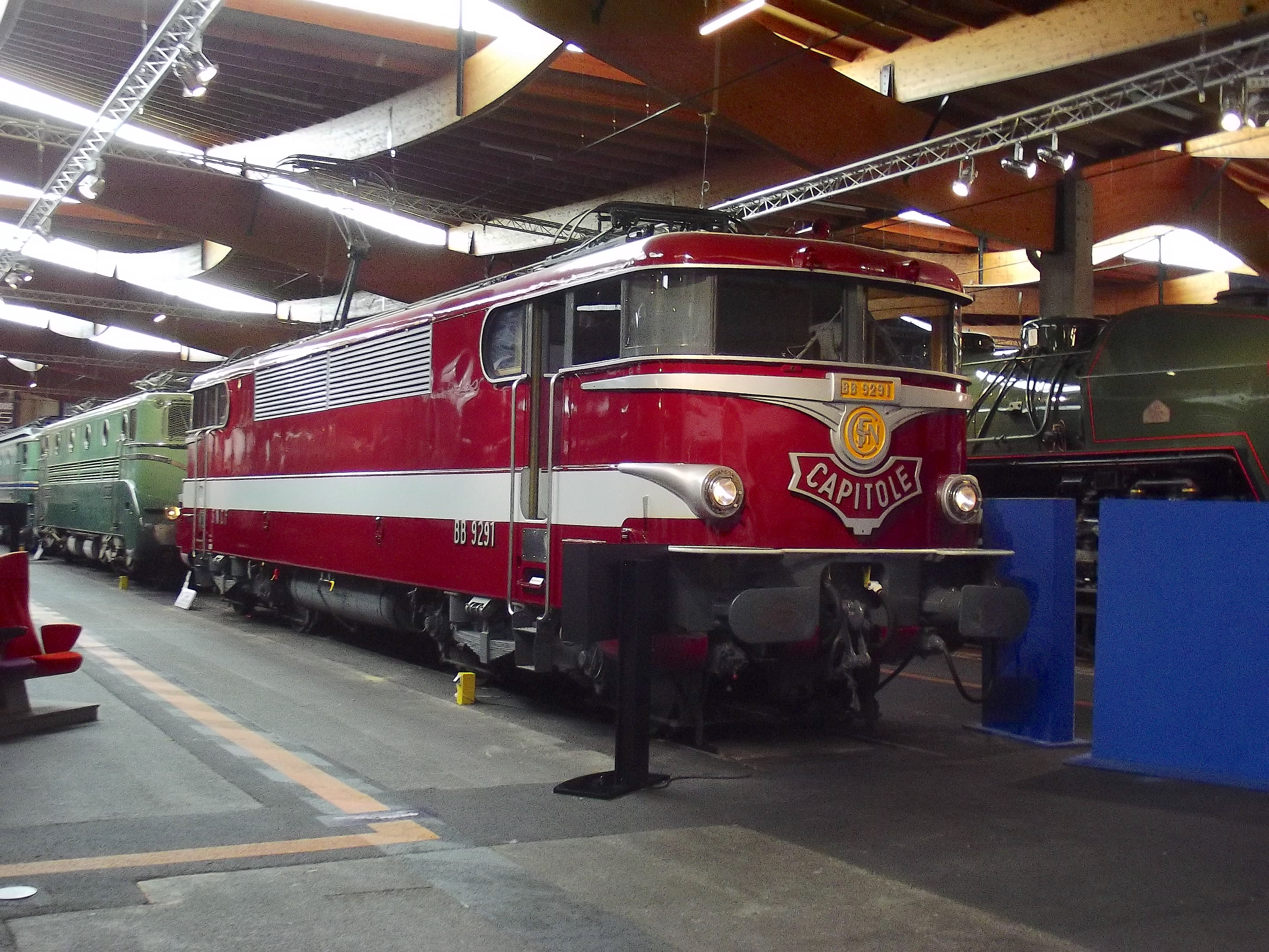 Capitole 9200 locomotief